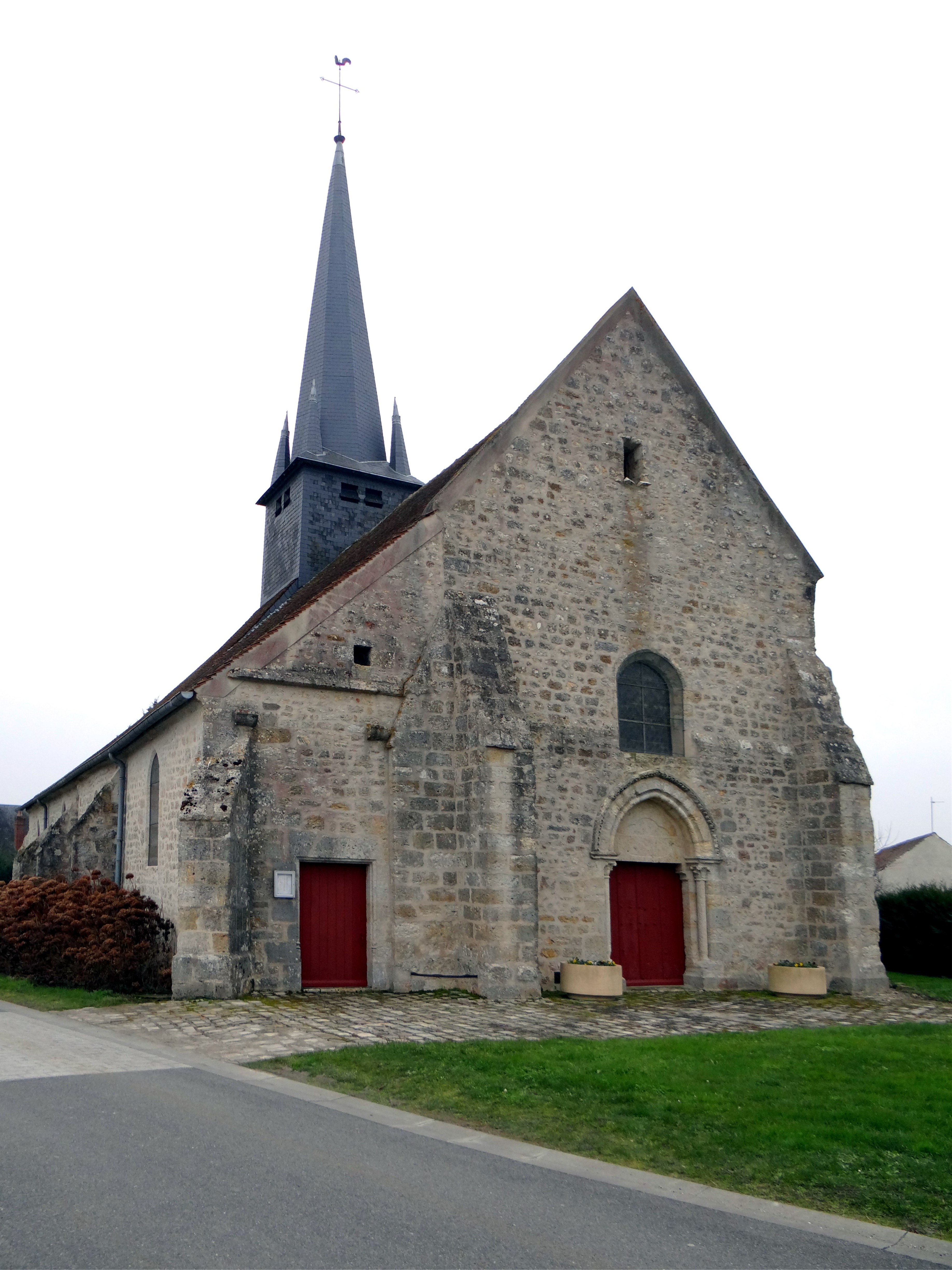 Eglise Saint-Denis, Ouzouer-sous-Bellegarde, Loiret, France.